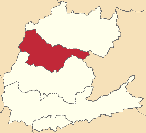 Mapa localizacor del cantón en Napo, Ecuador